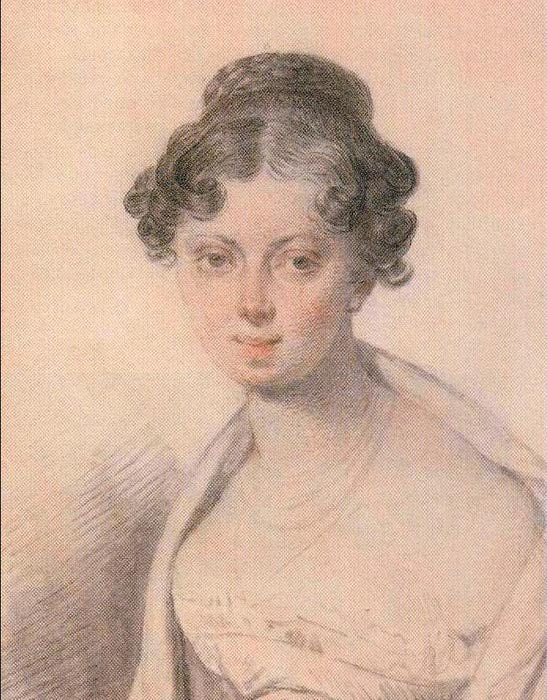 Наталья Максимовна Бенкендорф, ур. Алопеус (1796—1823), с 1814 года супруга Константина Христофоровича Бенкендорфа.